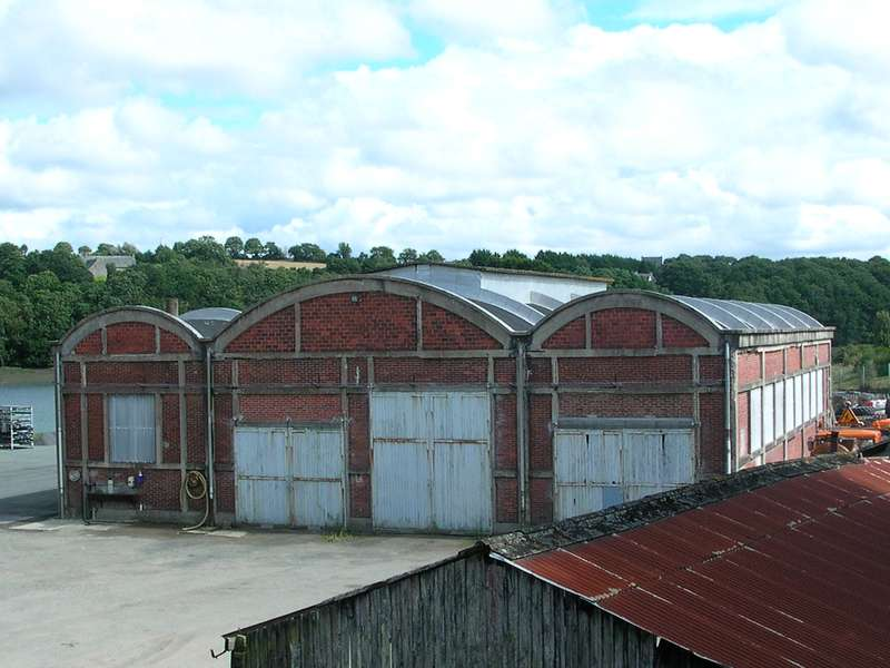 Le dépôt des Chemins de Fer des Côtes-du-Nord à Tréguier en 2005